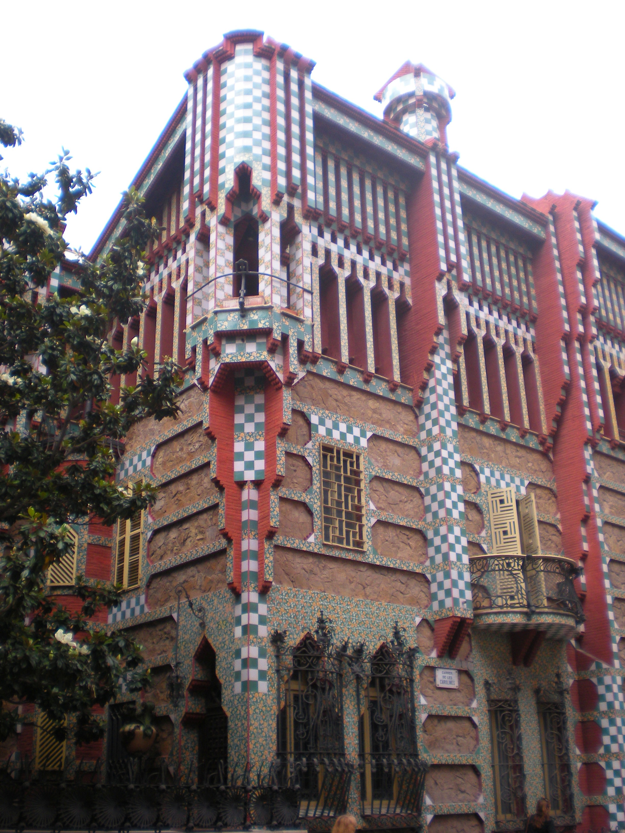 Casa Vicens (Barcelona)